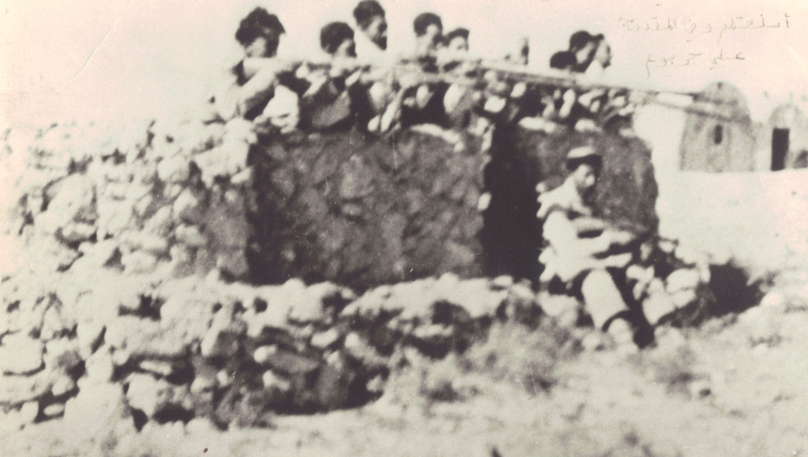 المقاومون شاهرين أسلحتهم يتقدمهم علي جربوع